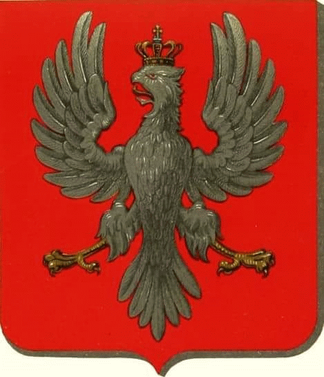 Wersja mała herbu Królestwa Polskiego